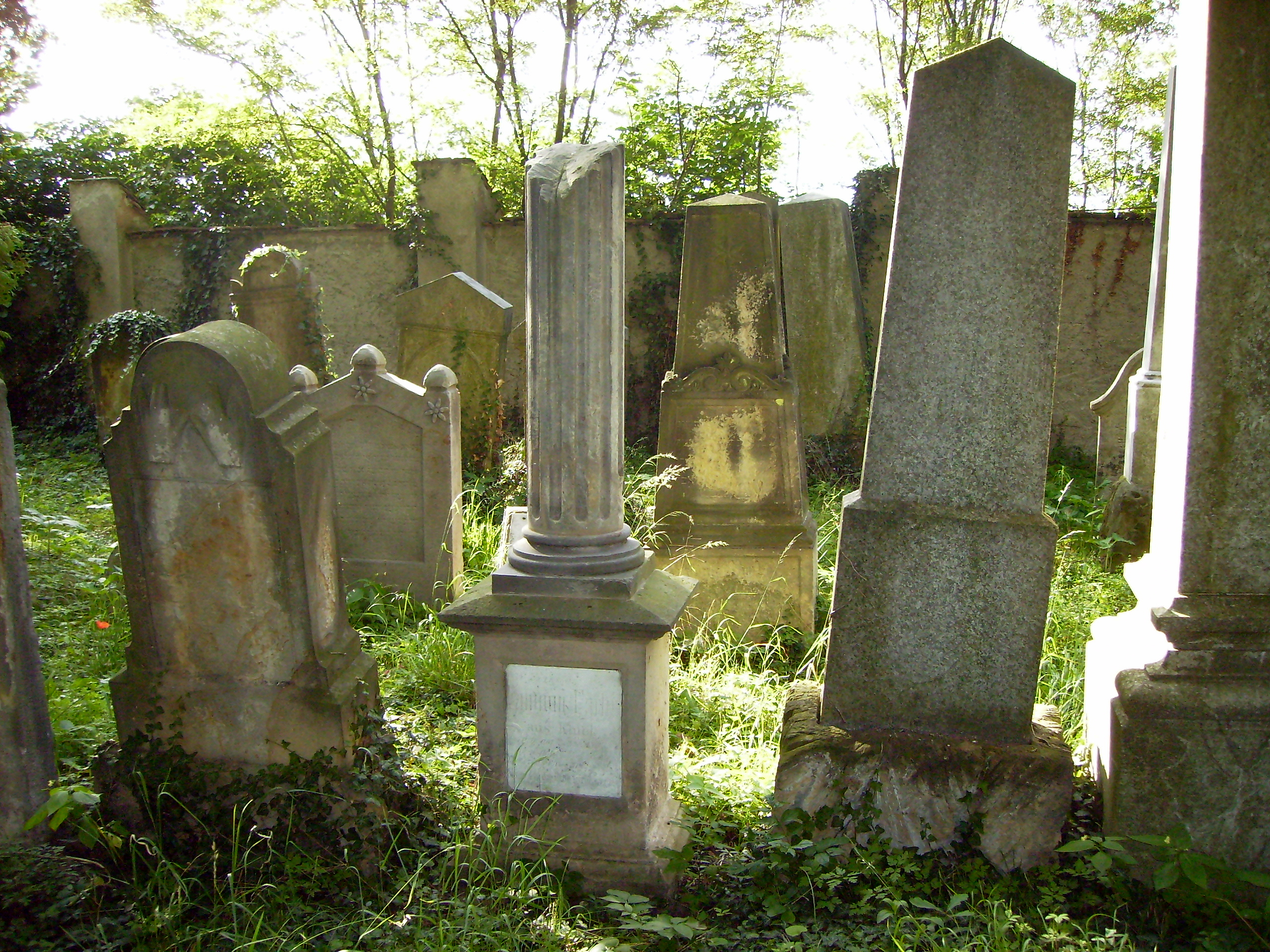 Židovský hřbitov v Kovanicích.